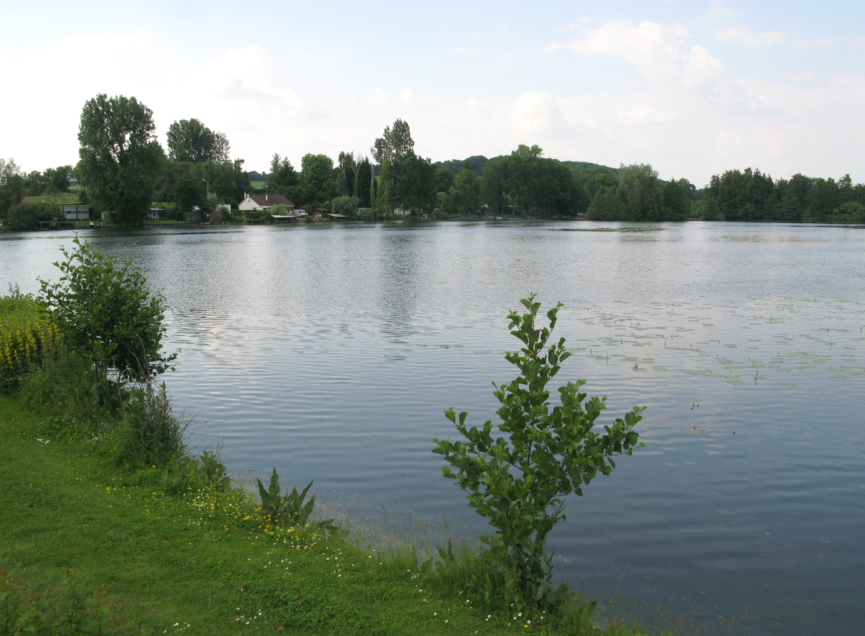 Cappy (Somme, France) - L'étang. Le village est situé sur la droite.